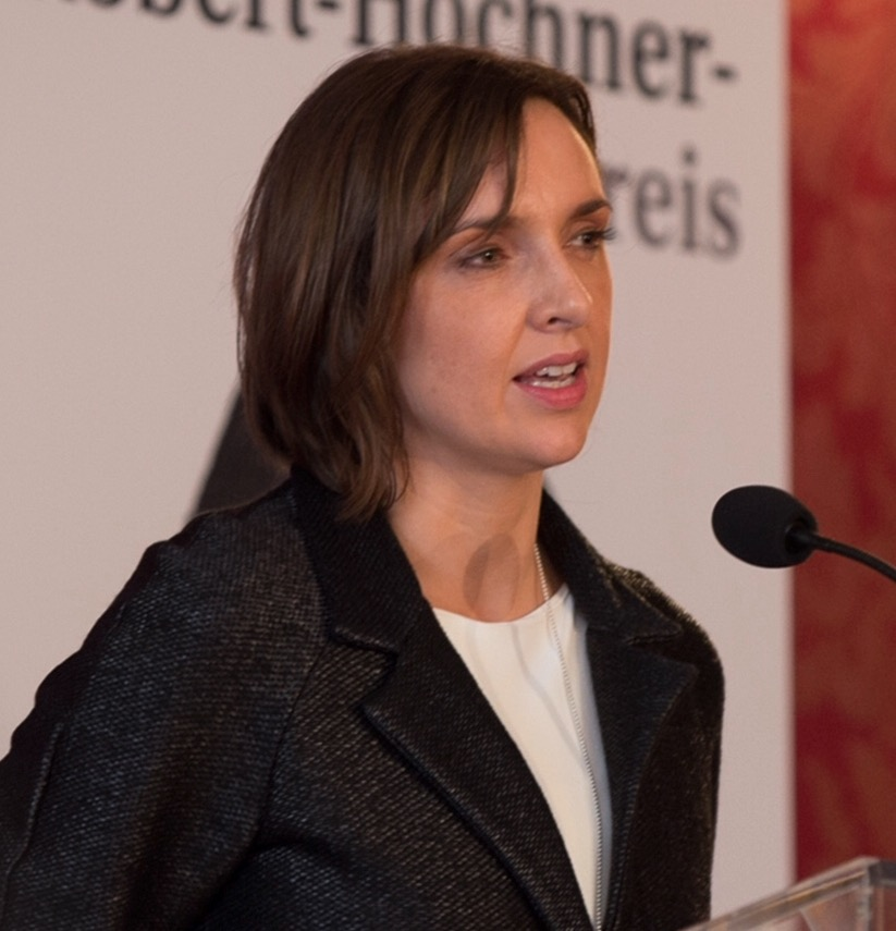 Susanne Schnabl-Wunderlich bei der Verleihung des 21. Kurt Vorhofer-Preises und des 12. Robert Hochner-Preises am 30. Mai 2016.